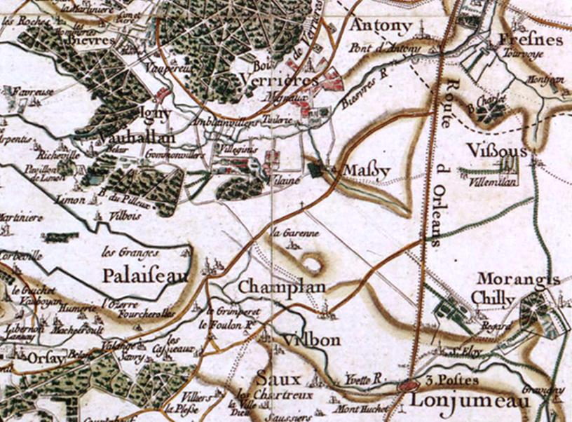 Carte de la région de Massy au XVIIe siècle selon Cassini.